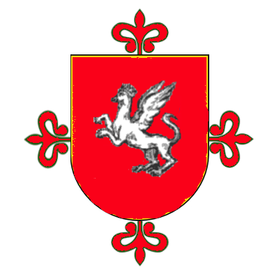 Armas de TOGORES sobre cruz de Calatrava